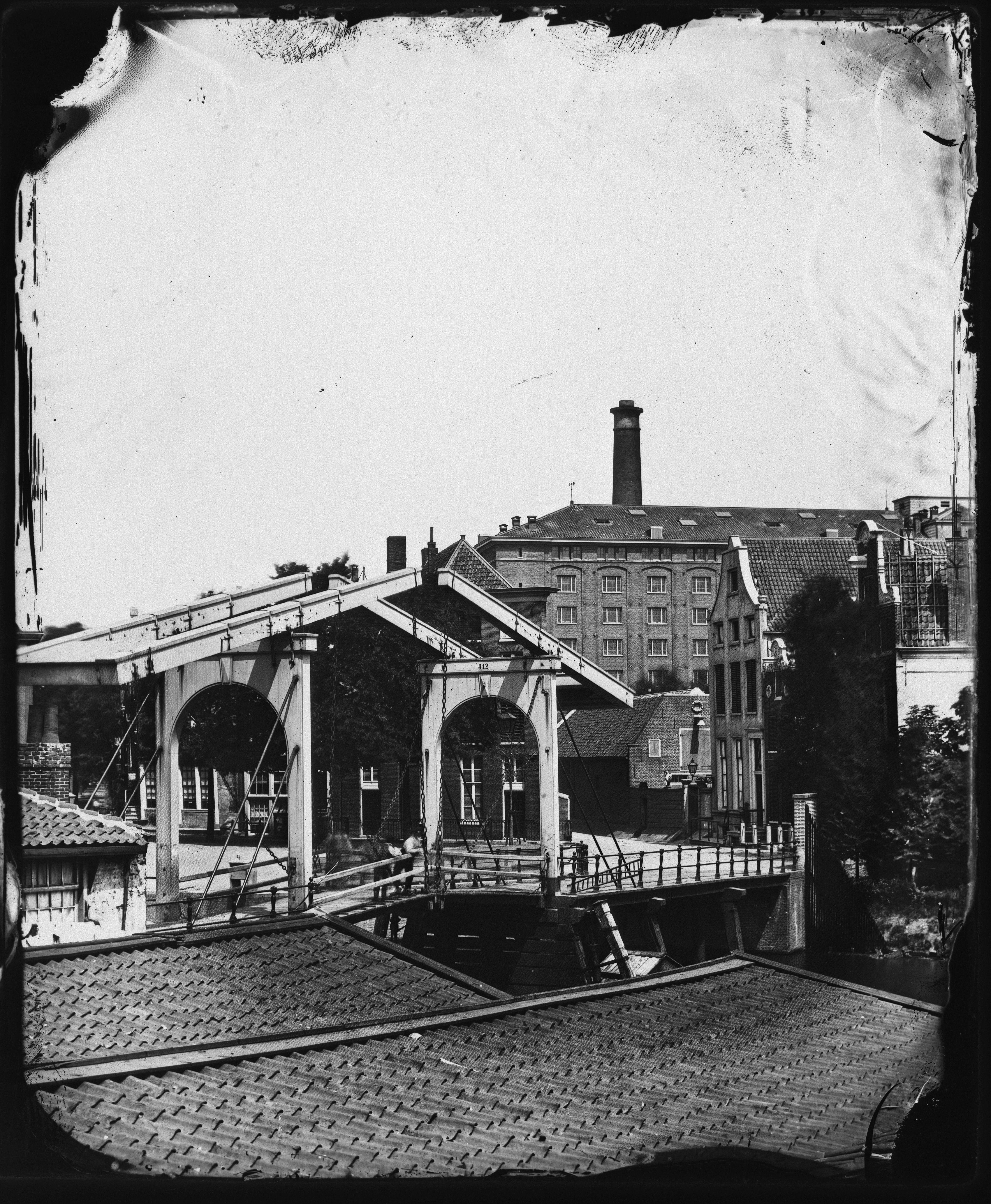 Beschrijving Bickersplein 1``, 2``, 3 (links``, v.r.n.l.) Gezien vanaf de Haarlemmer Houttuinen naar brug nr. 312 over de Eilandsgracht naar de Grote Bickersstraat (rechts). Op de voorgrond zijn daken van twee loodsen aan de Haarlemmer Houttuinen. Documenttype foto Vervaardiger Olie``, Jacob (1834-1905) Collectie Collectie Jacob Olie Jbz. Datering 1863 t/m 1864 Geografische naam Bickersplein Inventarissen Afbeeldingsbestand 10019A000545 Generated with Dememorixer